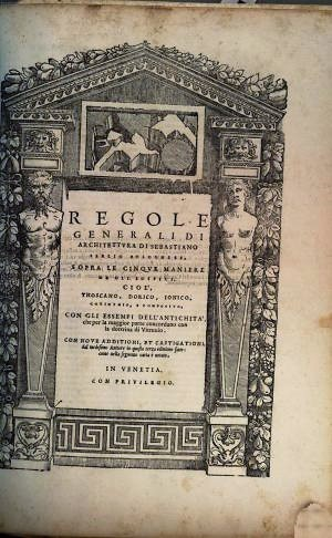 Seine Vorstellungen, wie Architektur auszusehen hätte, verbreitete er in seinen mehrbändigen Büchern